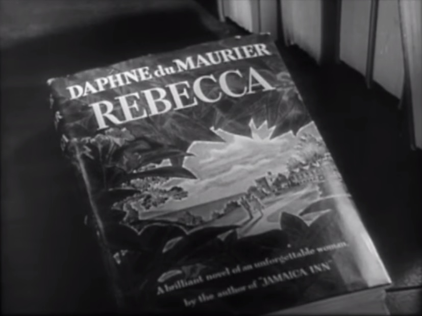 Imagen del trailer del film Rebecca que muestra la novela Rebeca de Daphne du Maurier.